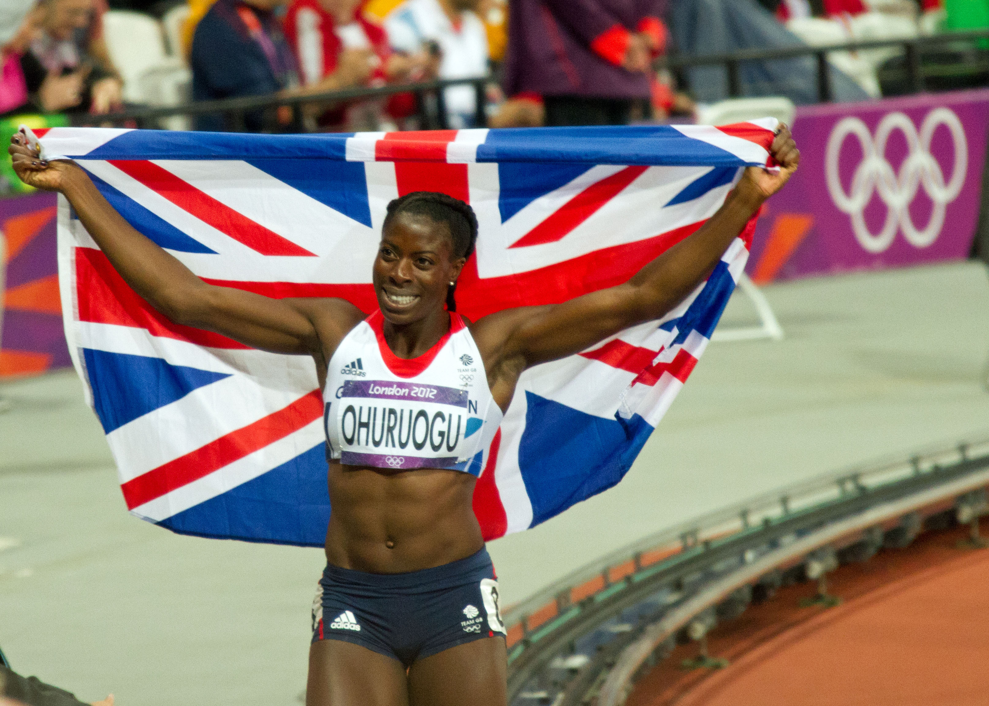 Christina Ohuruogu-Silver medalist London 2012